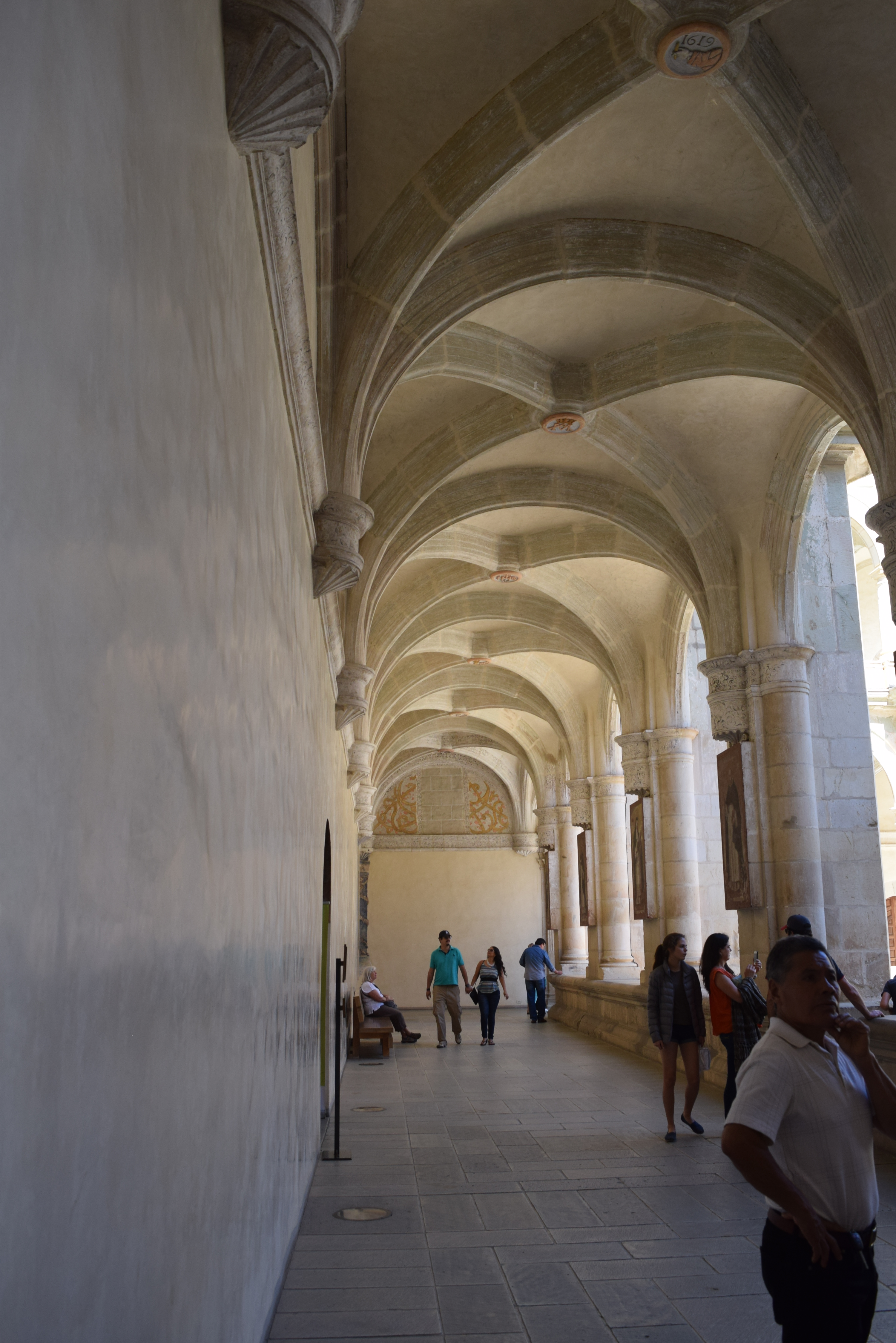 Pasillo principal del Claustro del Ex Convento de Santo Domingo de Guzmán en la ciudad de Oaxaca México